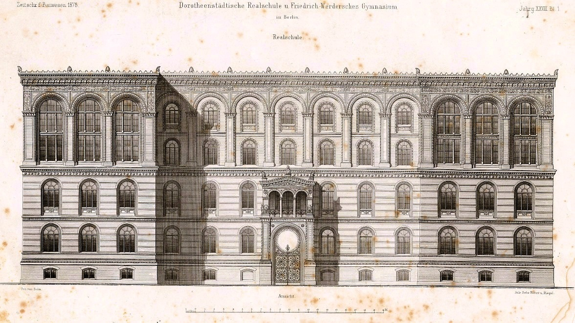 Dorotheenstädtische Realschule u. Friedrich Werdersches Gymnasium, Berlin, Ansicht der Realschule. Das Gebäude wurde nach einem Gesamtkonzept des Stadtinspektors Hanel unter der Leitung von Hermann Blankenstein von 1871-1875 errichtet